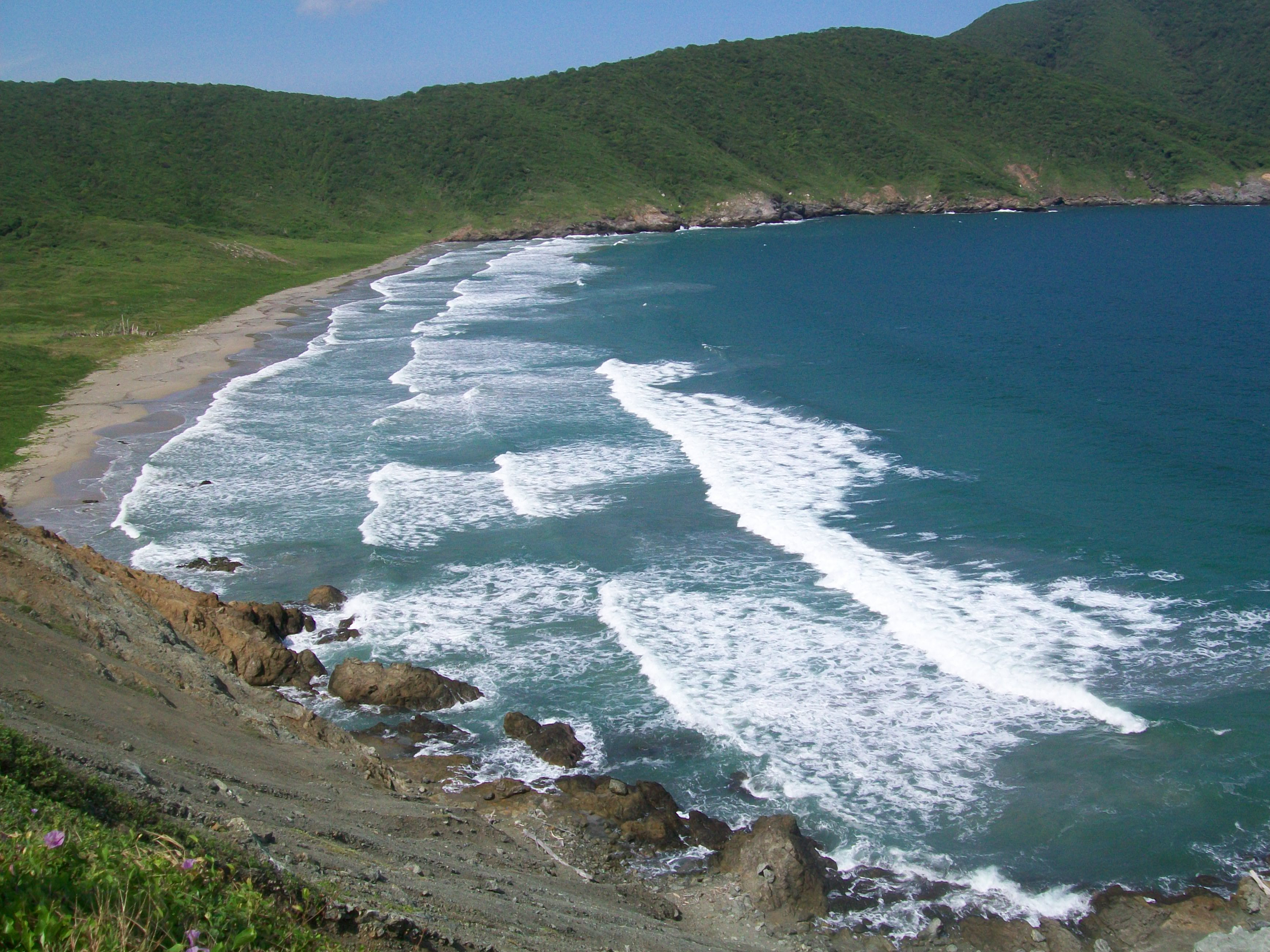 Esta es una de las playas mas panoramicas y hermosas del parque Tayrona.